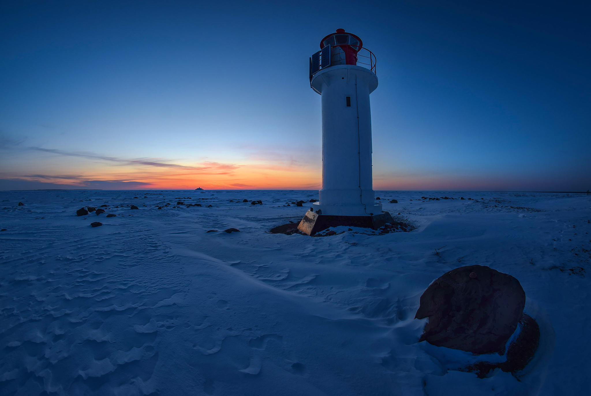 Manija tulepaak